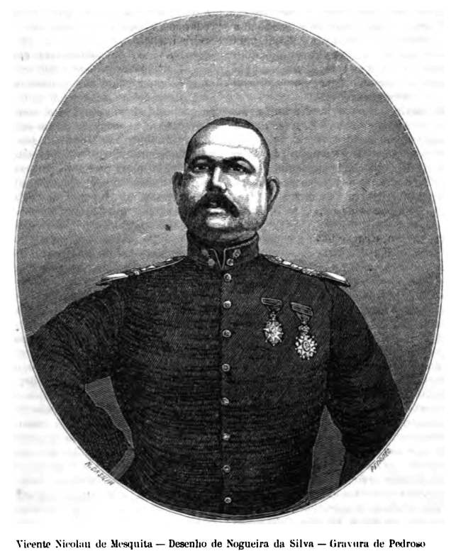 Engraving of Vicente Nicolau de Mesquita